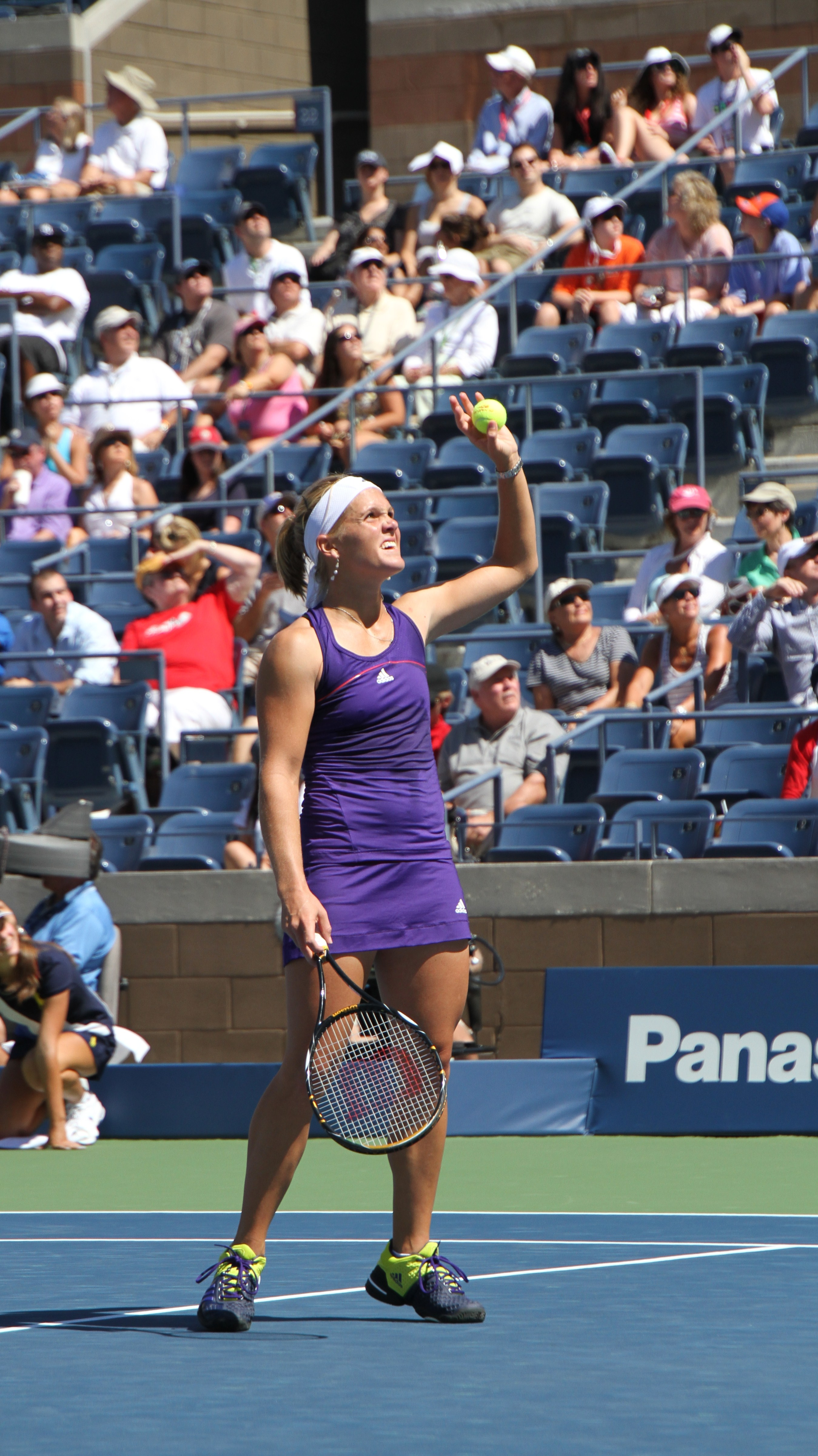 Melanie Oudin